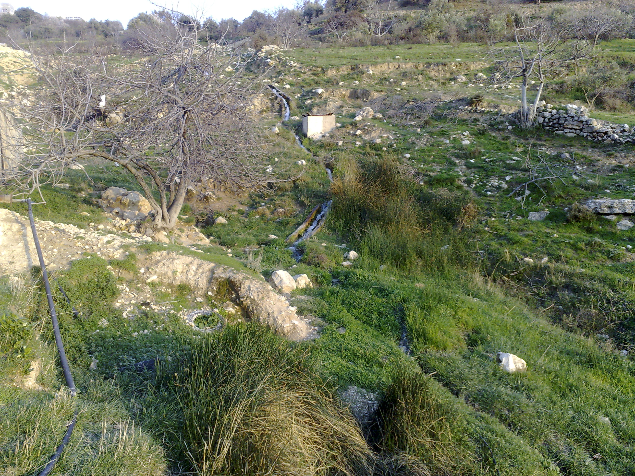 Mahis/Jordan